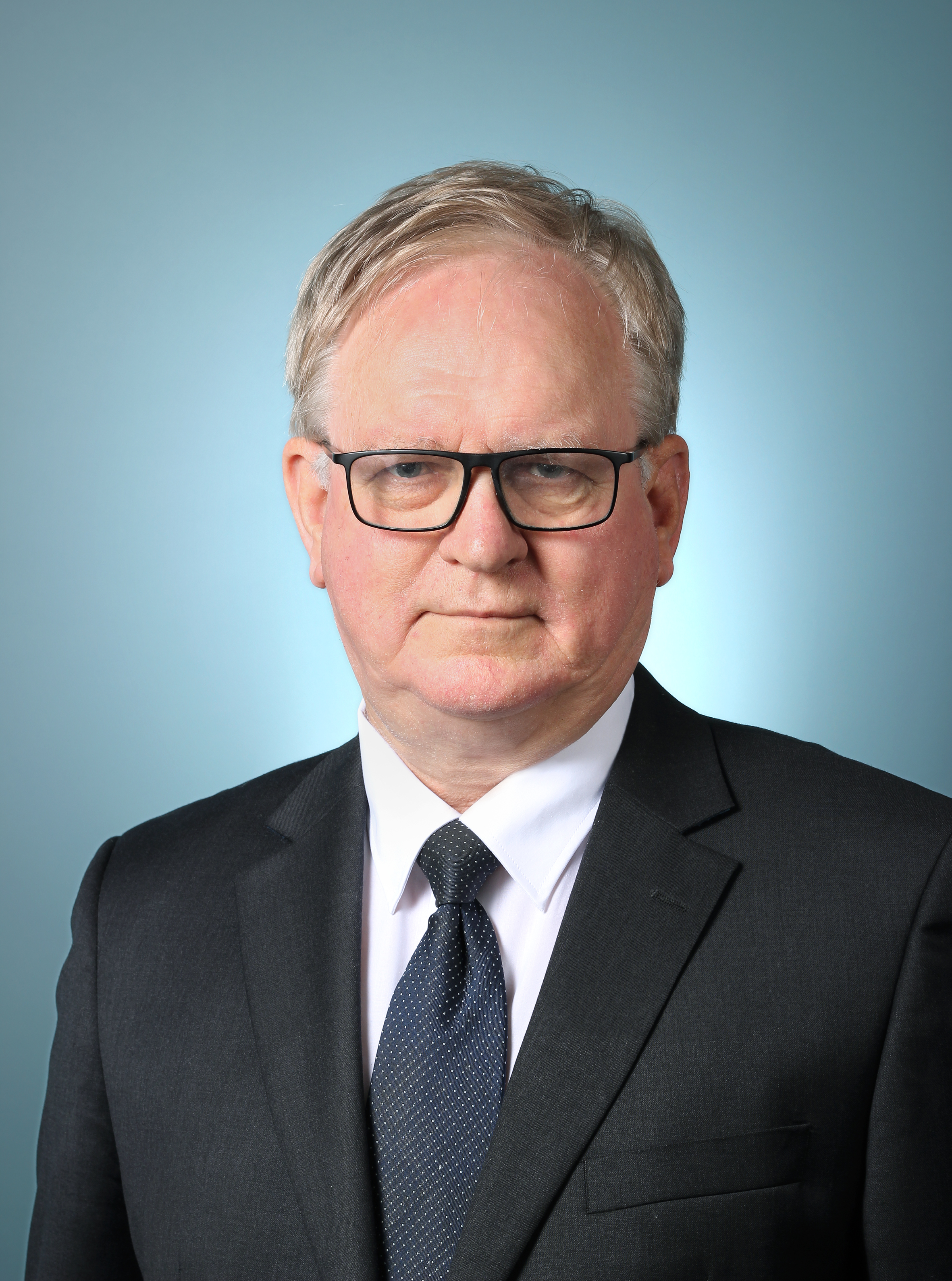 Passbild Prof. Schmitz